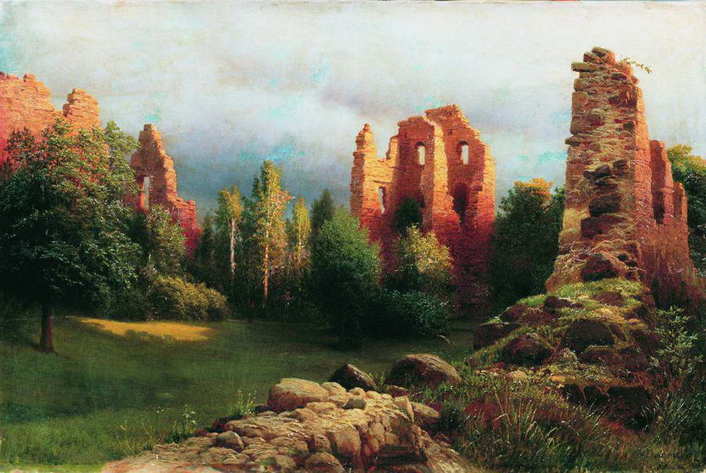 Pilt Gavriil Kondratenko (1854-1924) maalist. Vaade läänest I eeslinnuse õuelt peaväravatornile ja konvendihoone lõunanurgale XIX sajandi lõpus.